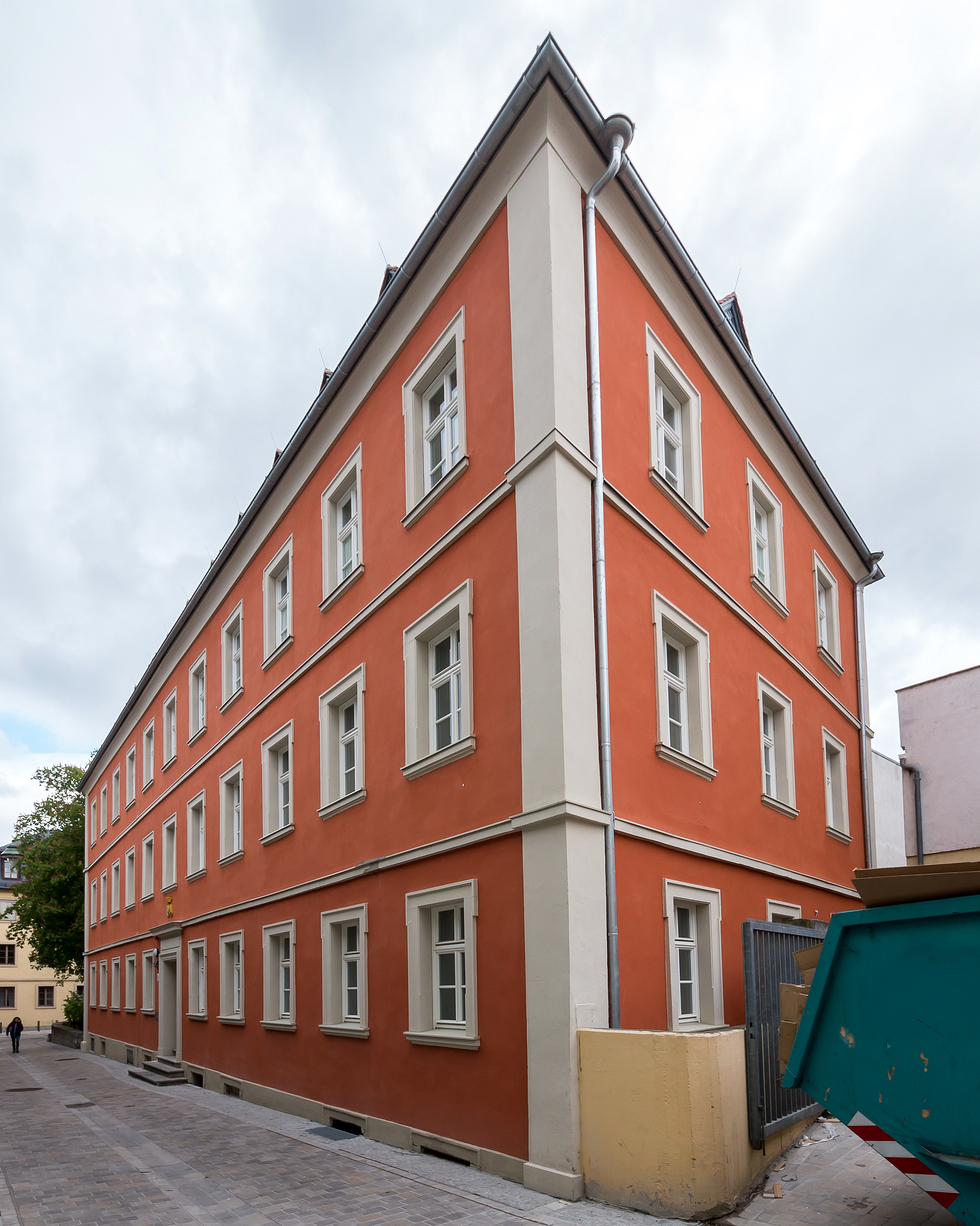 Würzburg Klinikstraße 6 Wohnhaus, ehemaliges Mathematisches Institut der Universität , Barock, spätes 18. Jahrhundert, Wiederaufbau 1953-54 II Akt.Nr.D-6-63-000-272